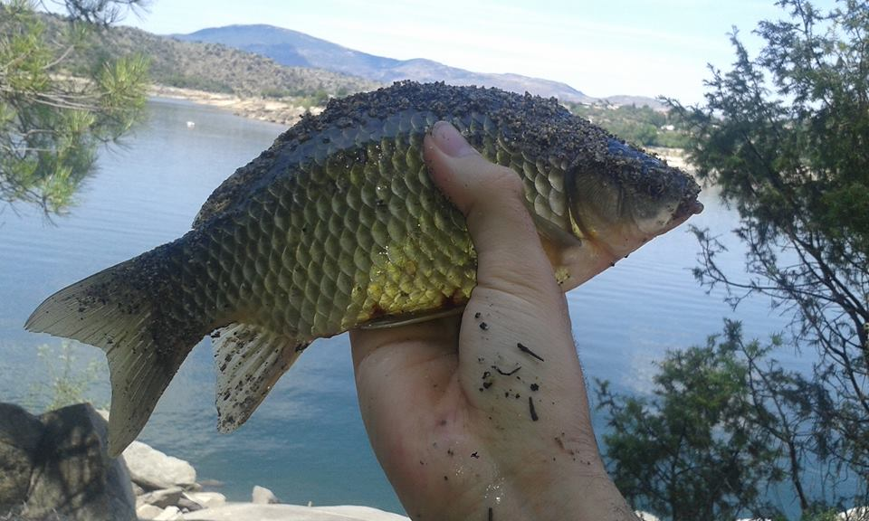 Carpín pescado a Feeder.